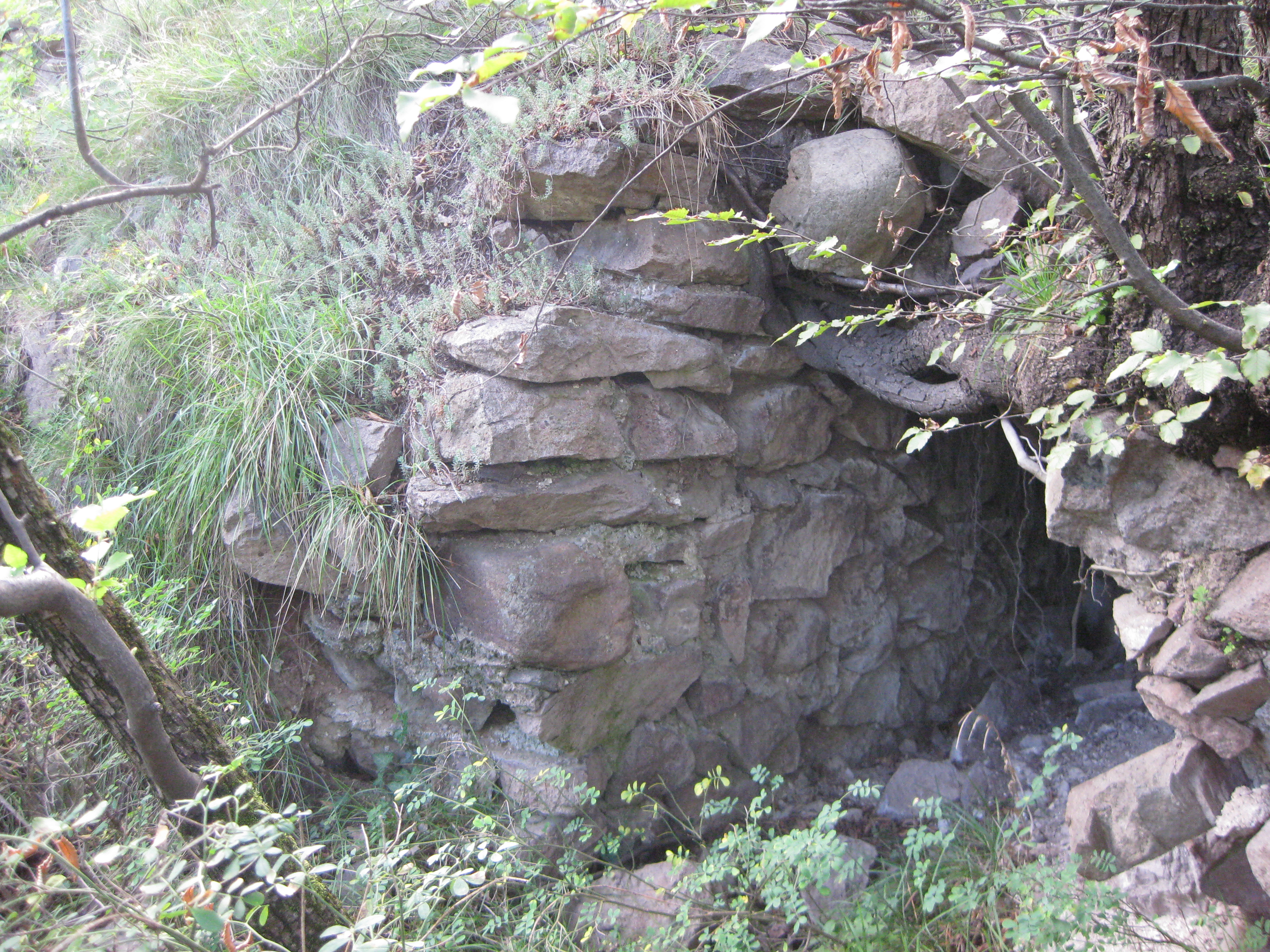 Spärliche Mauerreste der alten Burg Weineck (auch Weinegg geschrieben) am Virgl in Bozen (Südtirol)